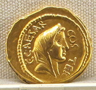 Ancient Roman coins in the Palazzo Massimo alle Terme